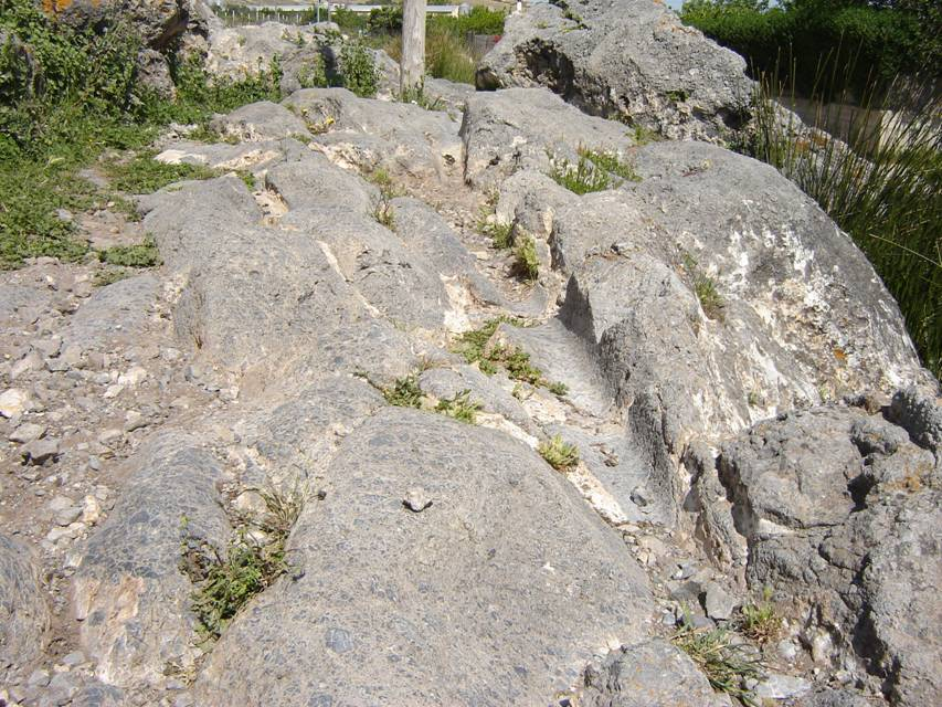 Vía íbero-romana construida en el ruta que comunicaba las ciudades de Sexi (Almuñécar) e Iliberri (Granada) a su paso por El Padul (provincia de Granada, España).